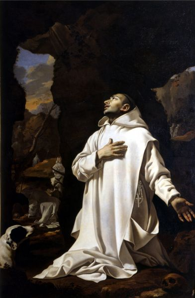 Saint Bruno en prière dans le désert. 1638. oil on canvasmedium QS:P186,Q296955;P186,Q12321255,P518,Q861259. Height: 220 cm (86.6 ″); Width: 144.5 cm (56.8 ″) dimensions QS:P2048,220U174728;P2049,144.5U174728. Avignon, Musée Calvet. Inventory number 828.4. Acquired from Pontmartin, 1828.